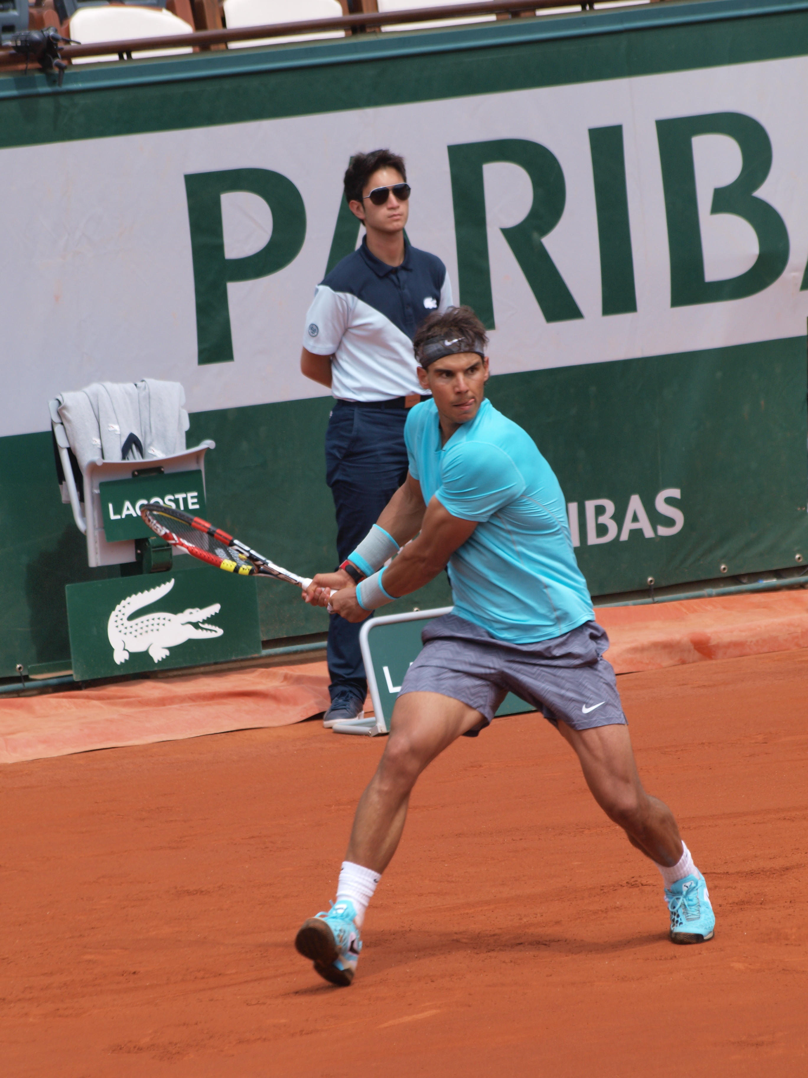 Internationaux de France de tennis, le 2 juin 2014, sur le court Philippe Chatrier : Raphaël Nadal